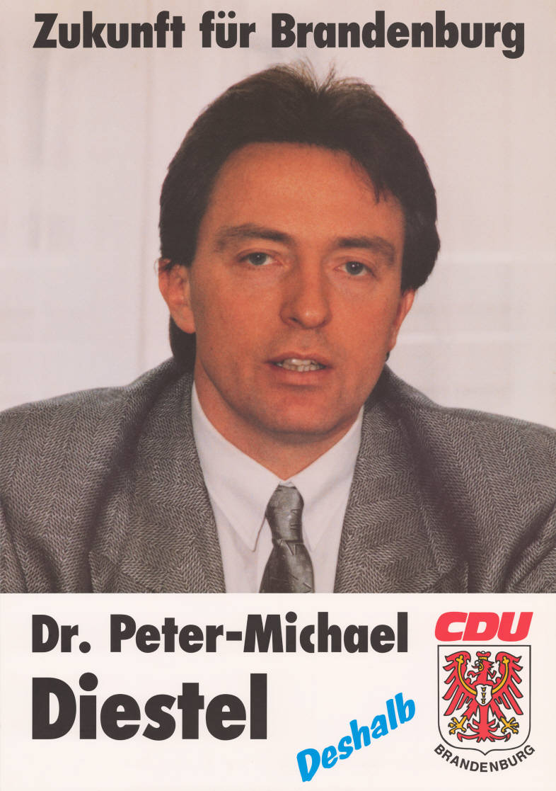 Zukunft für Brandenburg Dr. Peter-Michael Diestel Deshalb CDU Brandenburg Abbildung: Porträtfoto Plakatart: Kandidaten-/Personenplakat mit Porträt Auftraggeber: CDU Brandenburg Objekt-Signatur: 10-033 : 1 Bestand: Landtagswahlplakate Brandenburg (10-033) GliederungBestand10-18: Landtagswahlplakate Brandenburg (10-033) » CDU Lizenz: KAS/ACDP 10-033 : 1 CC-BY-SA 3.0 DE